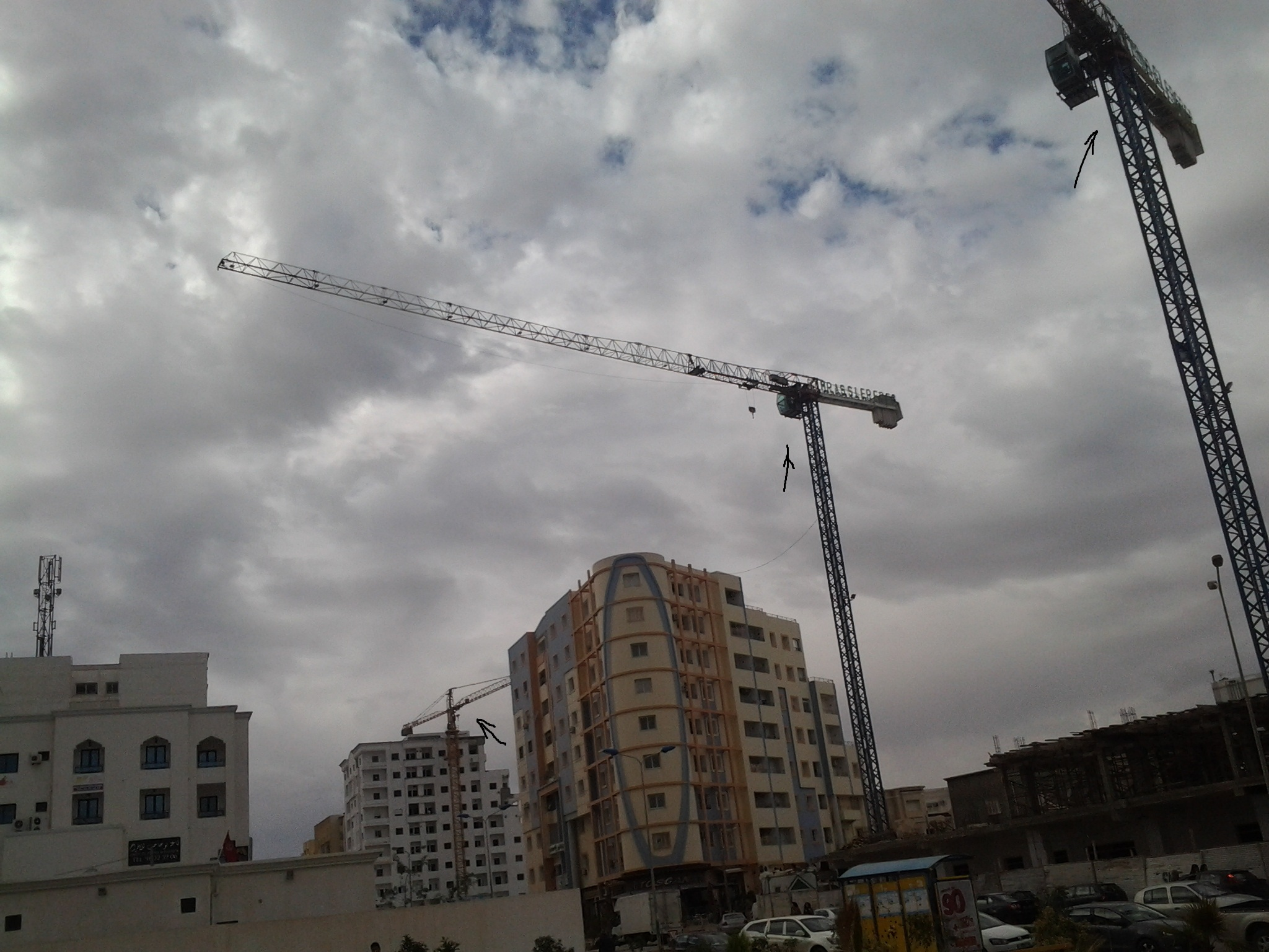 Une grue est un appareil de levage et de manutention réservé aux lourdes charges.